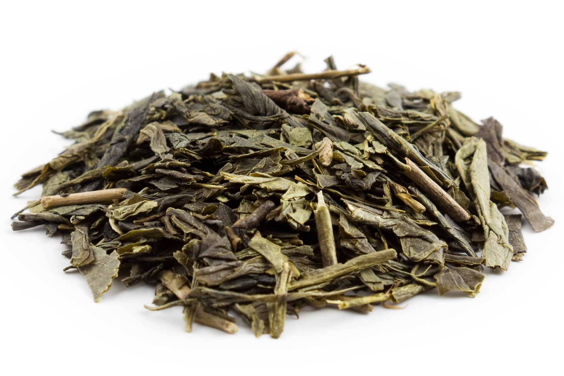 Sencha Japanischer Grüner Tee